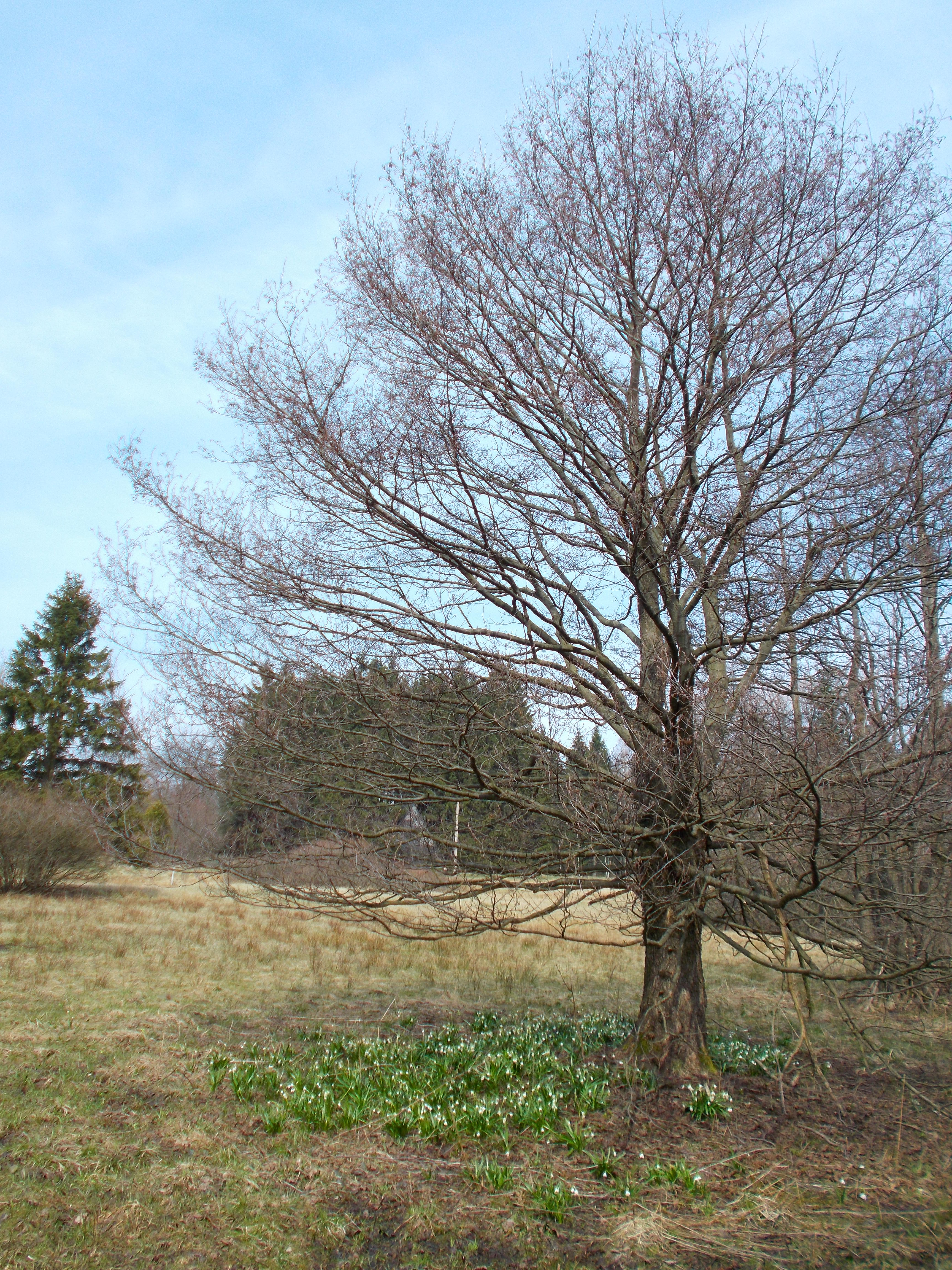 PP Rašelina